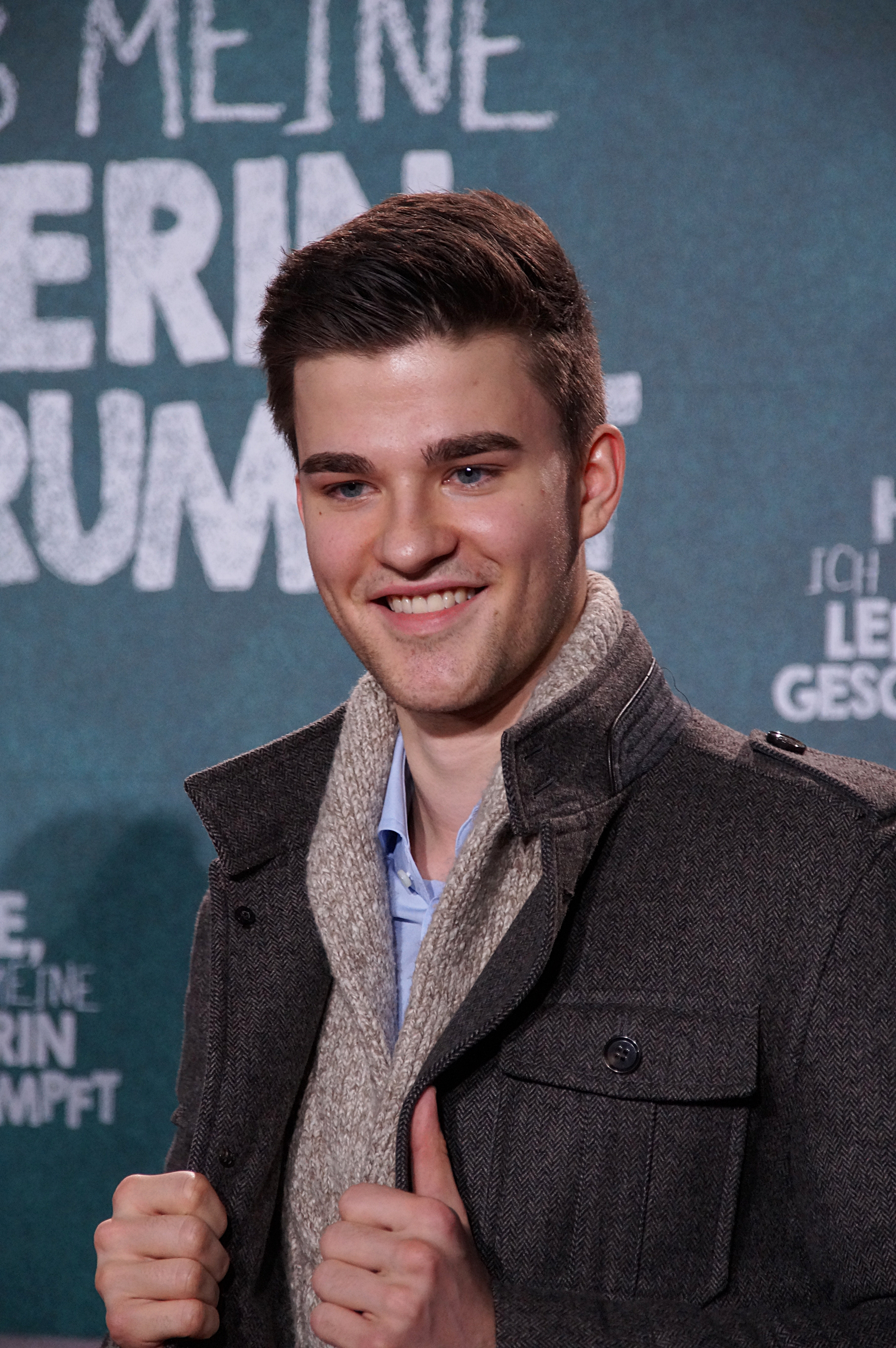 Patrick Mölleken bei der Premiere von "Hilfe, ich habe meine Lehrerin geschrumpft", im Dezember 2015.